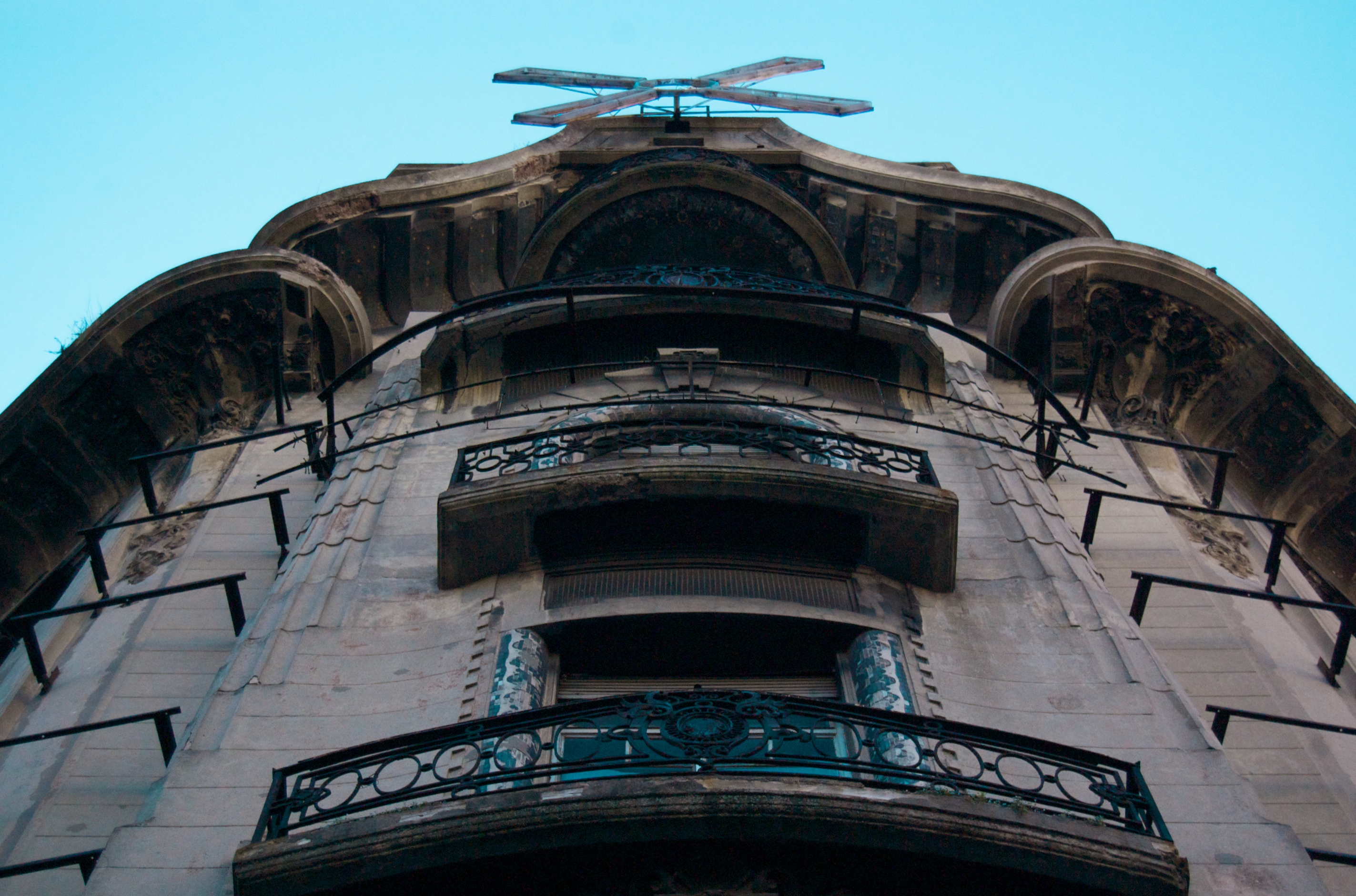 Fachada de la Confitería del Molino, Callao y Rivadavia, Balvanera (Congreso), Buenos Aires, Argentina.